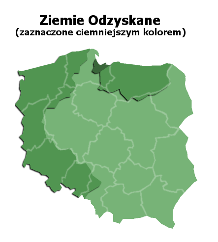 Ziemie Odzyskane Polski / Recovered Territories in Poland (1945)